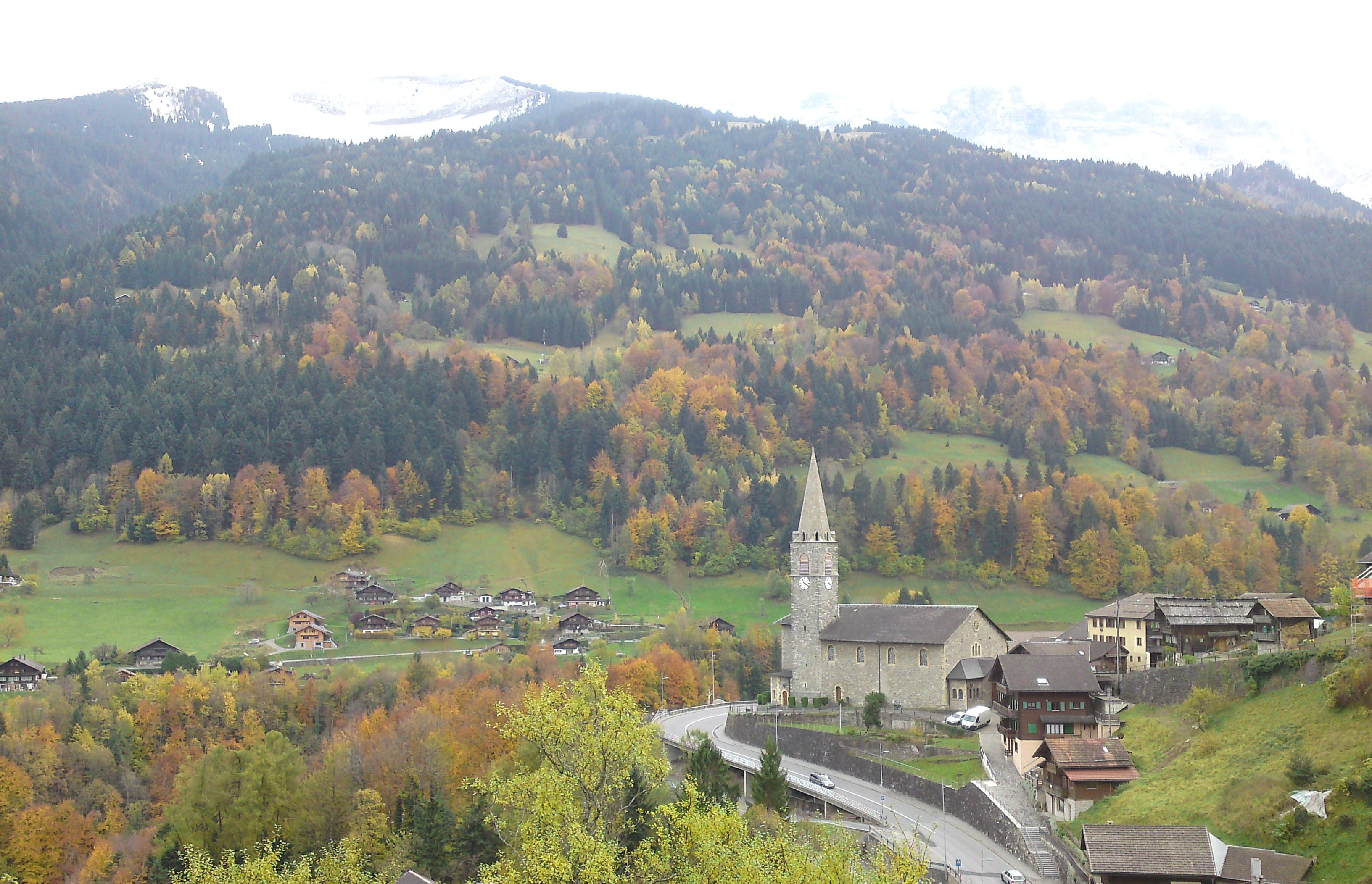 automne a Troistorrents